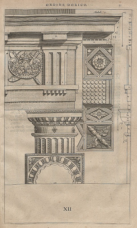 Original image description from the Deutsche Fotothek Architektur & Säule & dorische Ordnung & Kranz & Fries & Epistyl